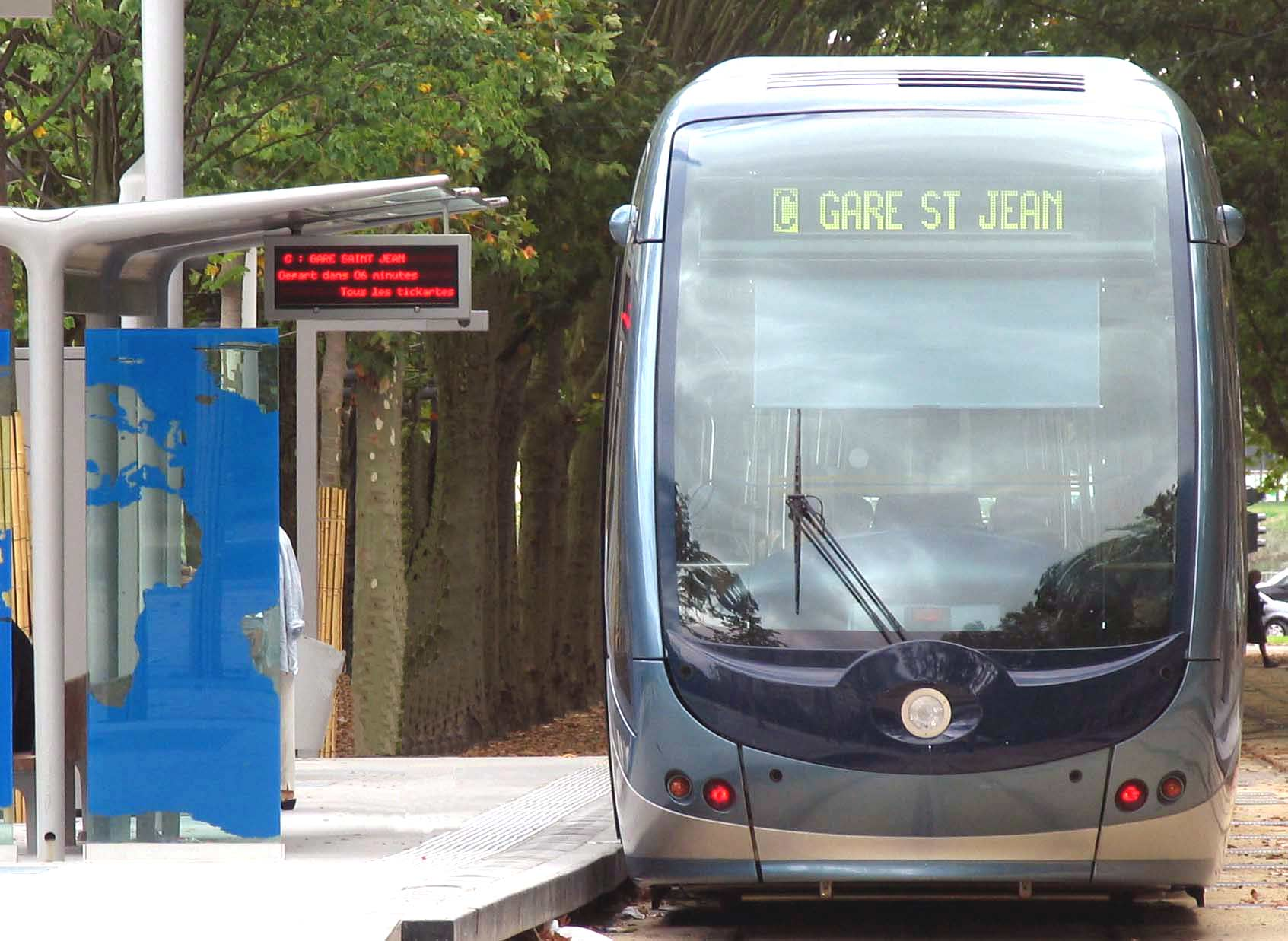 Face avant tramway Bordeaux ligne C à l'arrêt des Quinconces